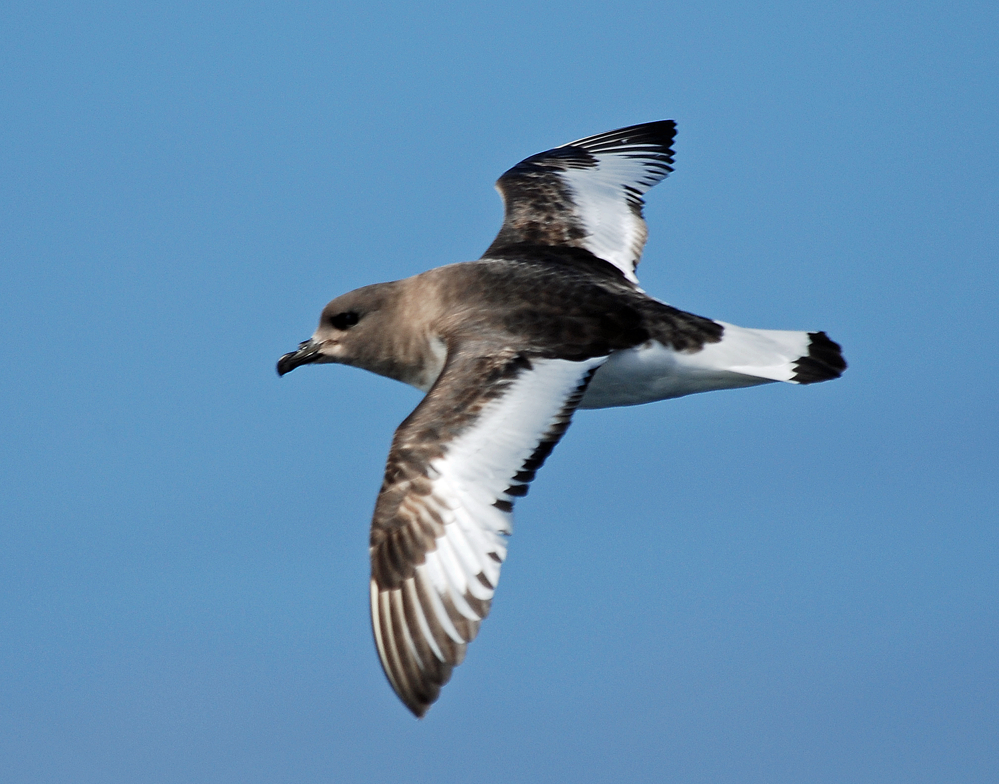 Antarctic Petrel, Antarctic Peninsula